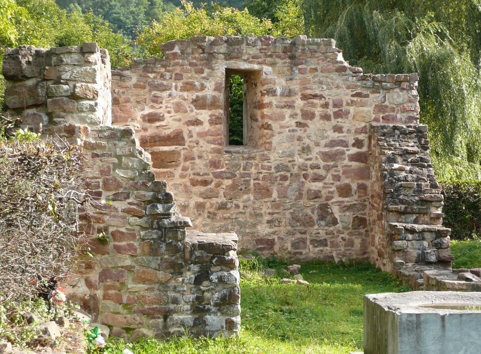 Laurentiuskirchenruine Münden